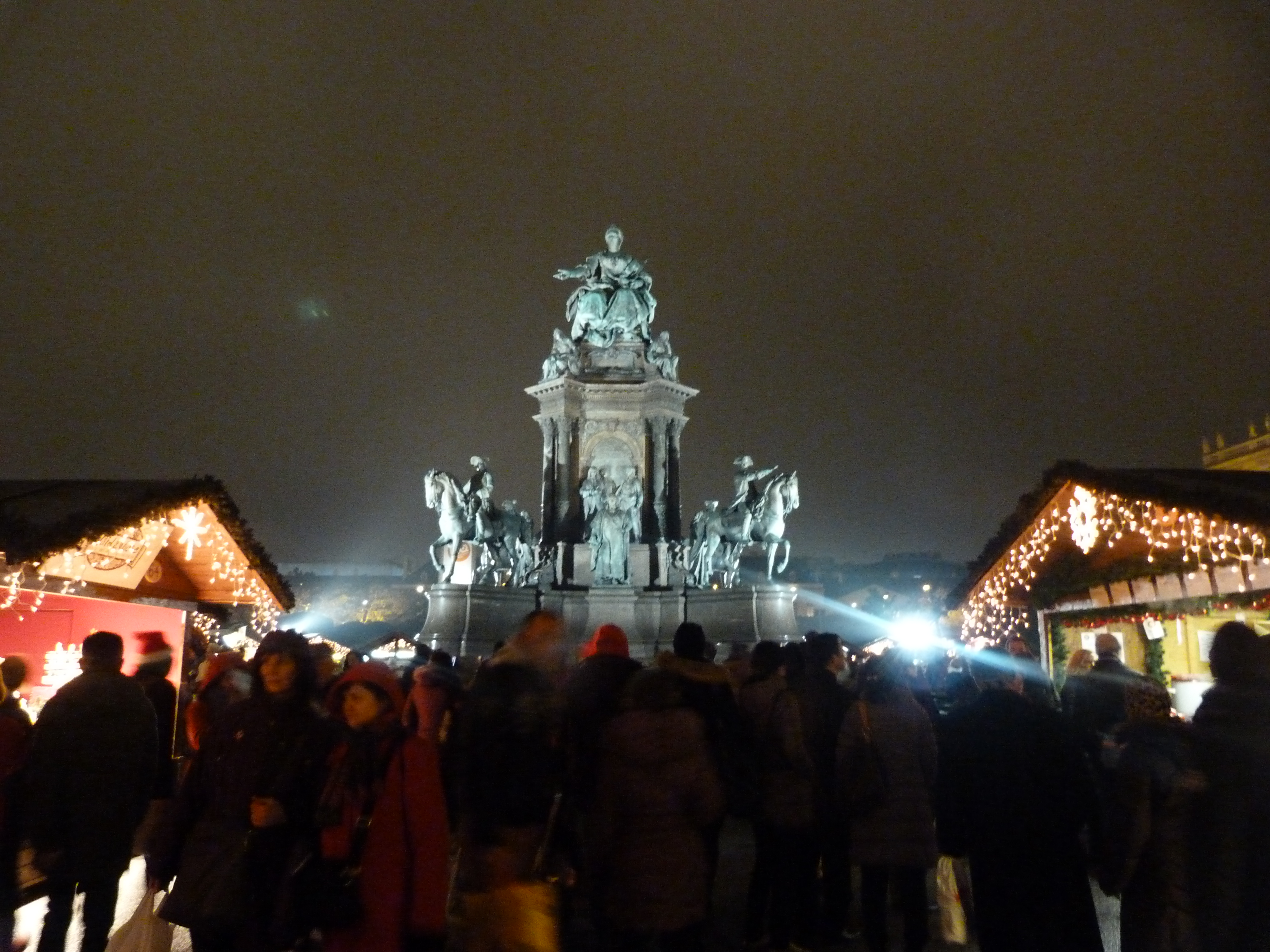 A felvétel 2014. december 3-én szerdán készült. Bécs, Karácsonyi Vásár. A Mária Therézia szobor környéke. ©© Derzsi Elekes Andor, Budapest, 2014, A kép és filmfelvételek egészben, vagy részletekben másolását, bármilyen úton történő sokszorosítását és felhasználását a szerző ellenérték nélkül, jogutódjaira is kihatóan megengedi. Az engedély kiterjed a kereskedelmi célú hasznosításra is. Kéri azonban nevének feltüntetését a felhasználás során. A Metapolisz sorozat valamennyi képe és filmje Creative Commons alatti valamint kereskedelmi - for profit - célra is felhasználható. Ajánlott hivatkozás: Derzsi Elekes Andor: Metapolisz DVD line